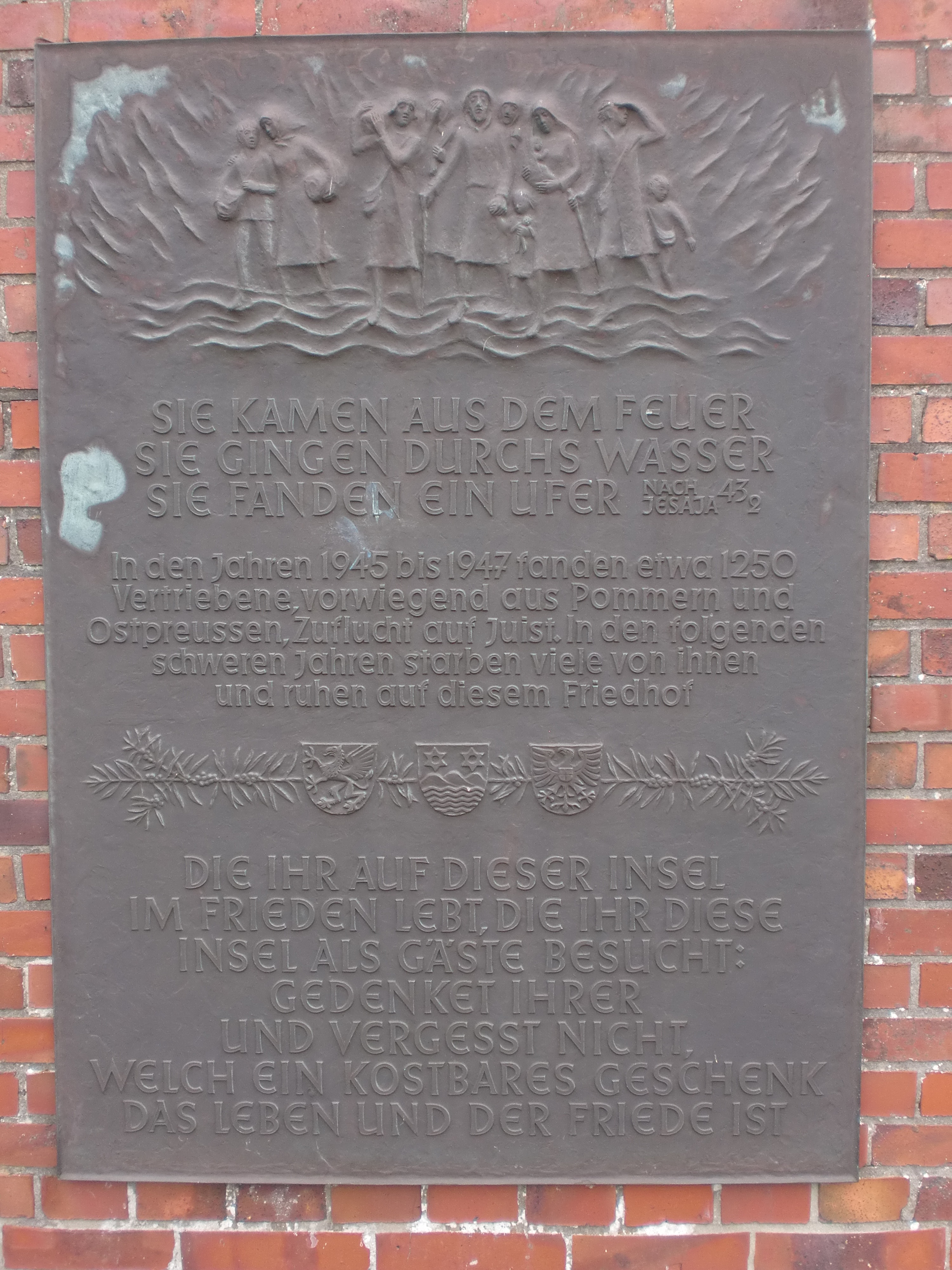 Gedenktafel für die Heimatvertriebenen aus Ostpreußen und Pommern an der Friedhofskapelle von Juist. Die Inschrift lautet: „Sie kamen aus dem Feuer. Sie gingen durch das Wasser. Sie fanden ein Ufer. Nach Jesaja 43/2. In den Jahren 1945 bis 1947 fanden etwa 1250 Vertriebene, vorwiegend aus Pommern und Ostpreußen, Zuflucht auf Juist. In den folgenden schweren Jahren starben viele von ihnen und ruhen auf diesem Friedhof. Die Ihr auf dieser Insel im Frieden lebt, die Ihr diese Insel als Gäste besucht: gedenket Ihrer und vergesst nicht, welch ein kostbares Geschenk das Leben und der Friede ist.“Im Boden unter der Tafel sind Gedenksteine mit den Namen der Gestorbenen eingelassen: File:Gedenksteine Juist.JPG